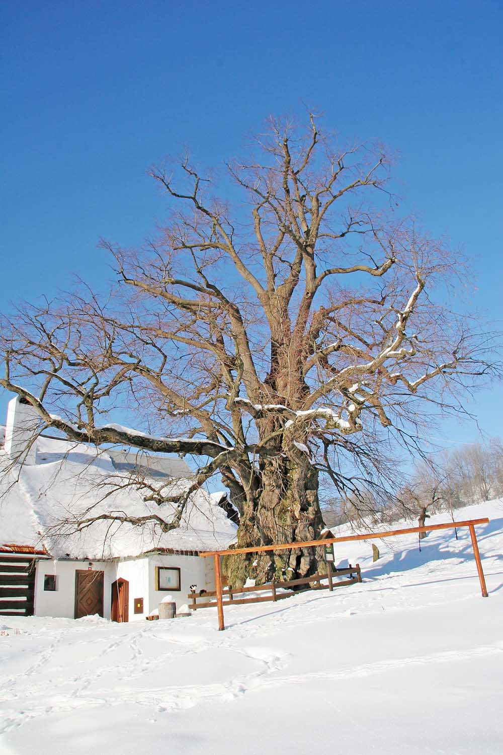 Památná Lukasovva lípa v obci Telecí